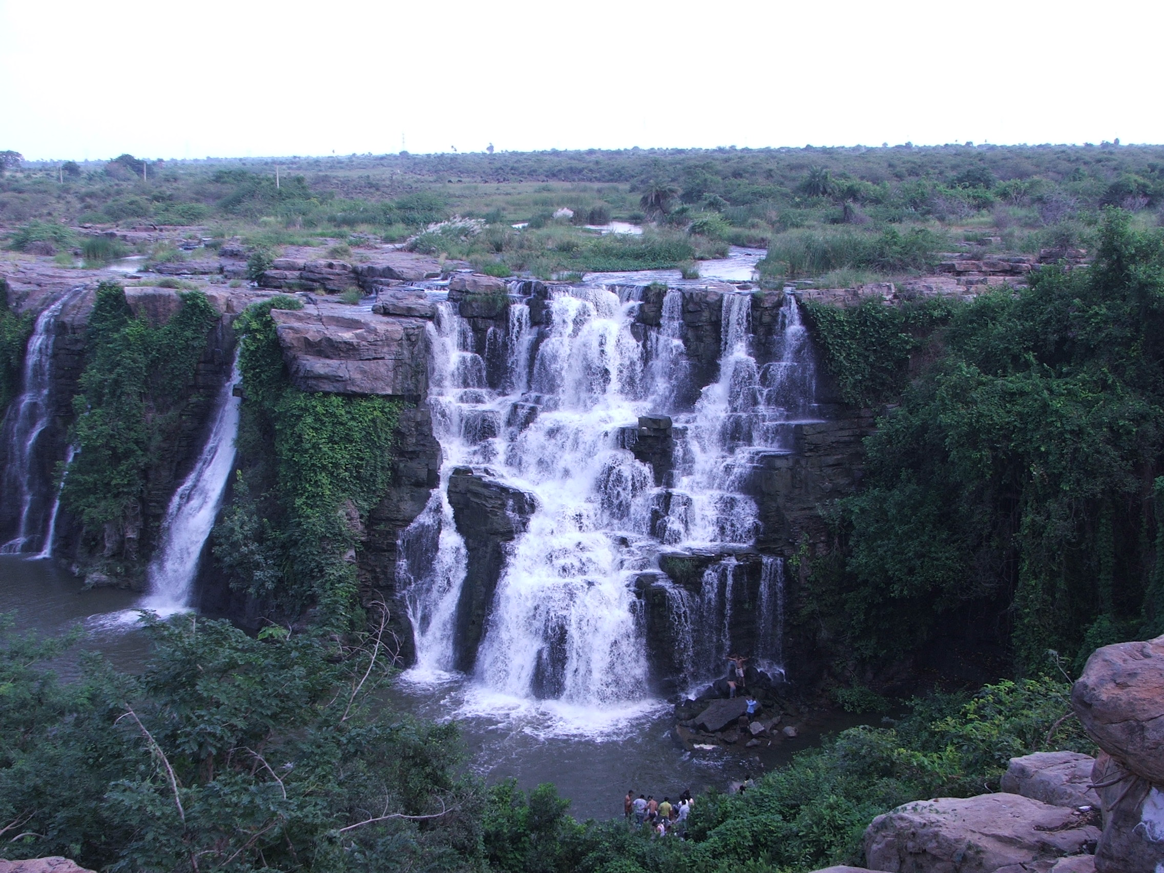 Nagarjuna sagar, Ethopia falls, Near to Hyderabad